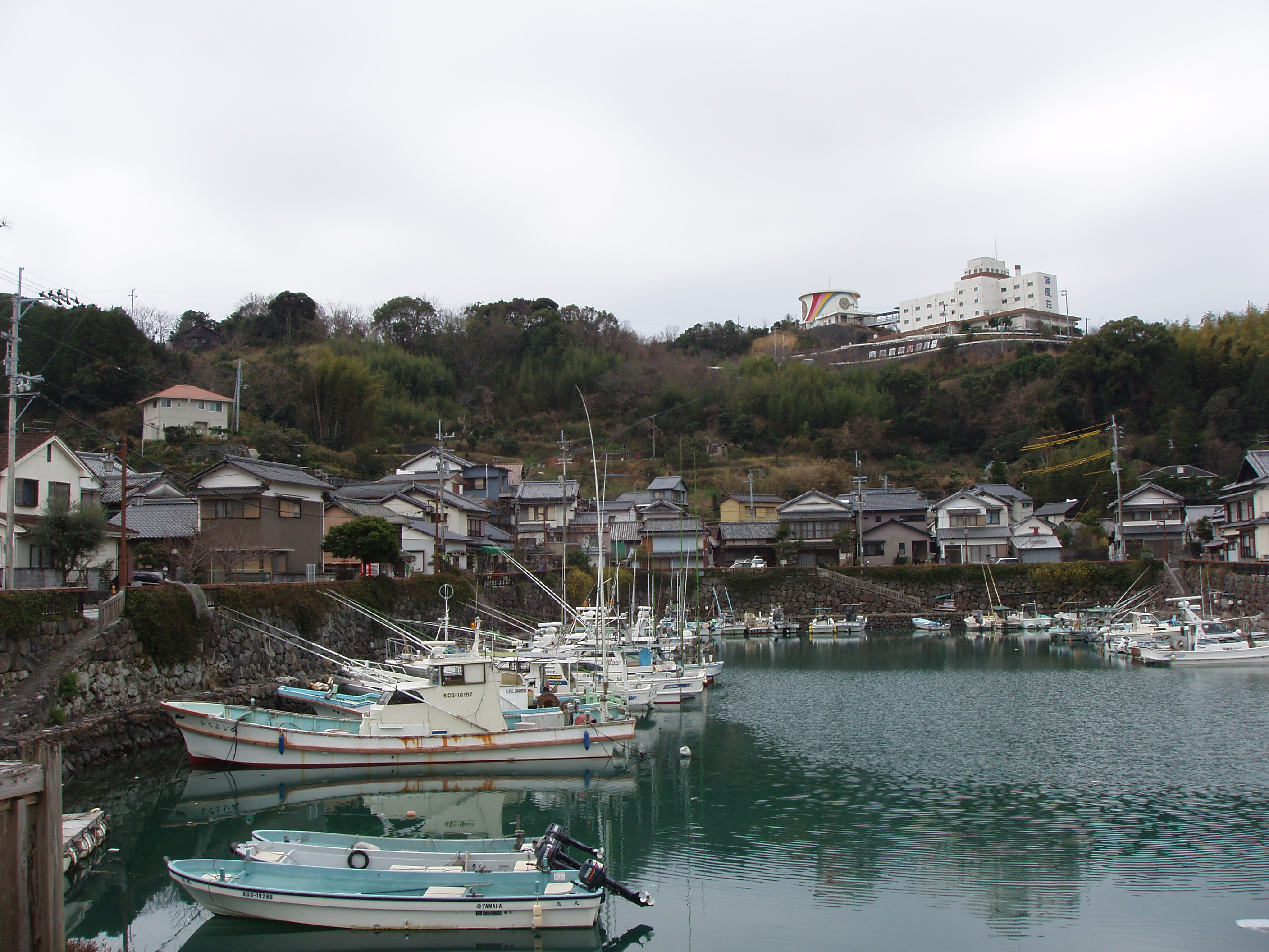 Tei Fishing Port